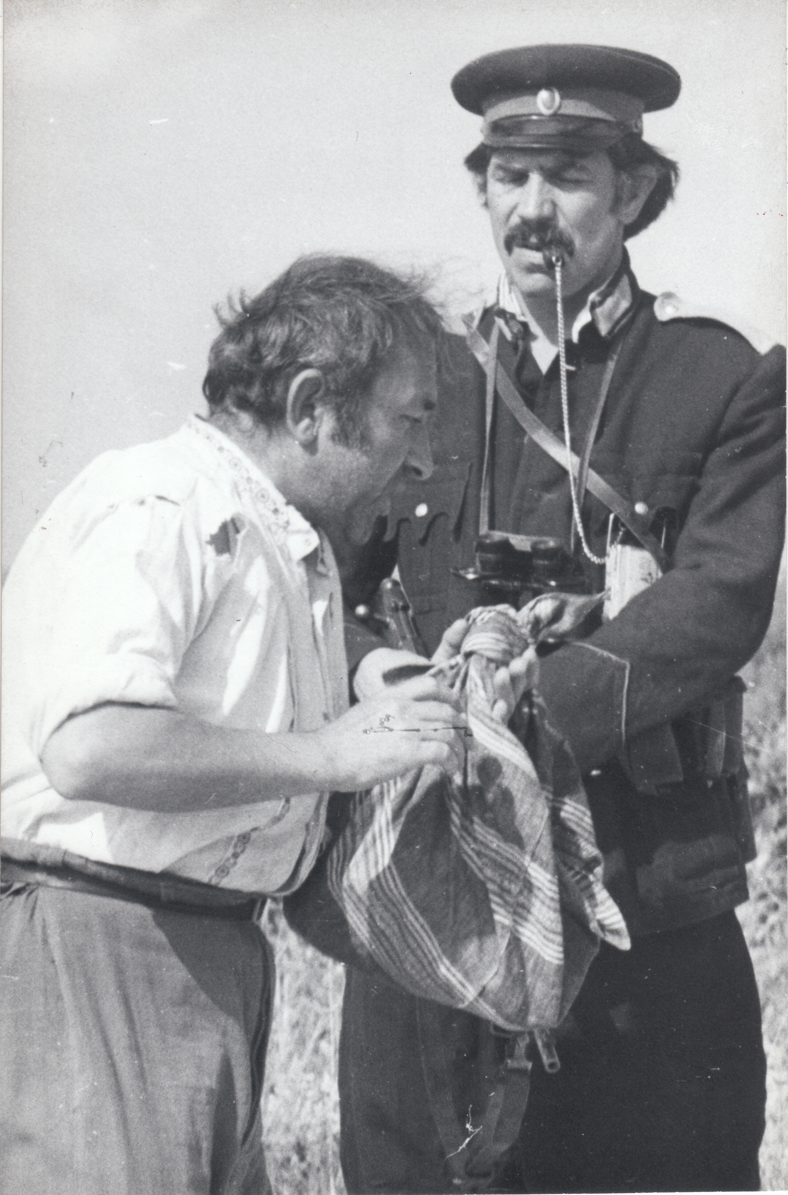 Телевизионна новела „Конвой“ - режисьор Слави Шкаров Минко Минков в ролята на Селянина с Климент Михайлов - Полицая